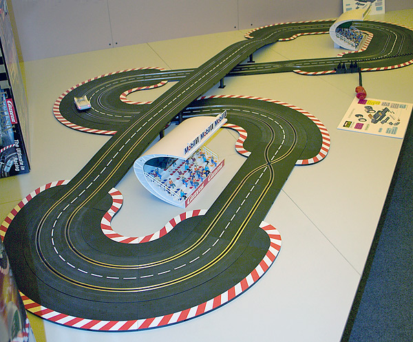 Carrerabahn im Maßstab 1:24 auf der Spielwarenmesse 2005